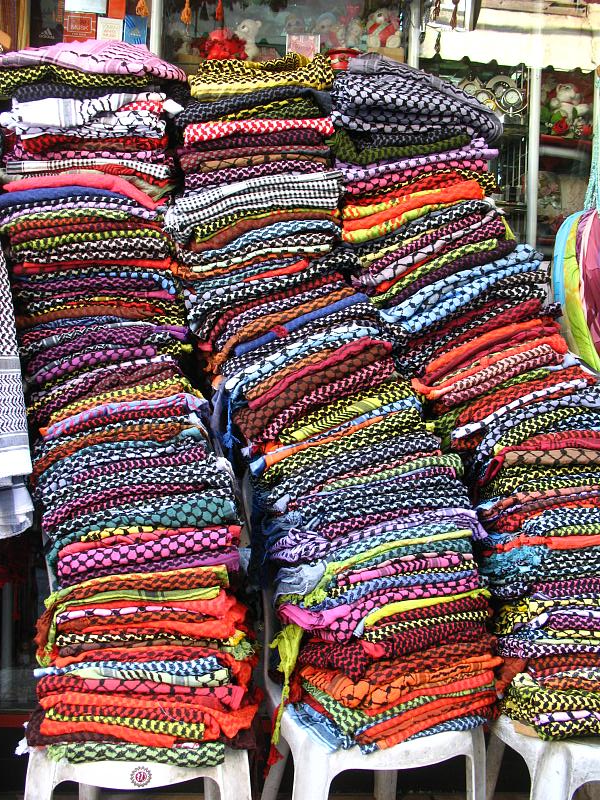 In alle kleuren Damascus, Syria